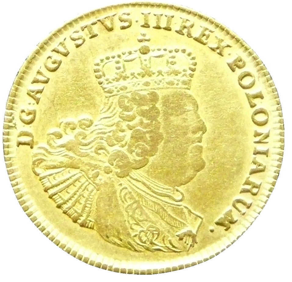 August d’or (5 Taler) 1756 August III. König von Polen (1733-1763) Wert = 5 Taler = 30 polnische Gulden Münzstätte Leipzig Prägung 1753-1756 Münzmeister Ernst Dietrich Croll im Amt 1753-1757 Münzfuß: 35 Stück auf die rauhe Mark Gold 21 Karat 8 Grän fein = 902,778‰ Feingewicht = 6,032 g Gewicht 6,682 g Ist-Gewicht: 6,64 g Durchmesser: 23,10-23,63 mm Dicke: 1,08 mm Brustbild des Königs mit Königskrone im Prunkharnisch mit Überwurf und Ordensband mit Kleinod vom Goldenen Vlies; Name und Herrschertitel als Umschrift in lateinischer Kapitalschrift von links beginnend: DEI GRATIA AUGUSTUS III REX POLONIARUM